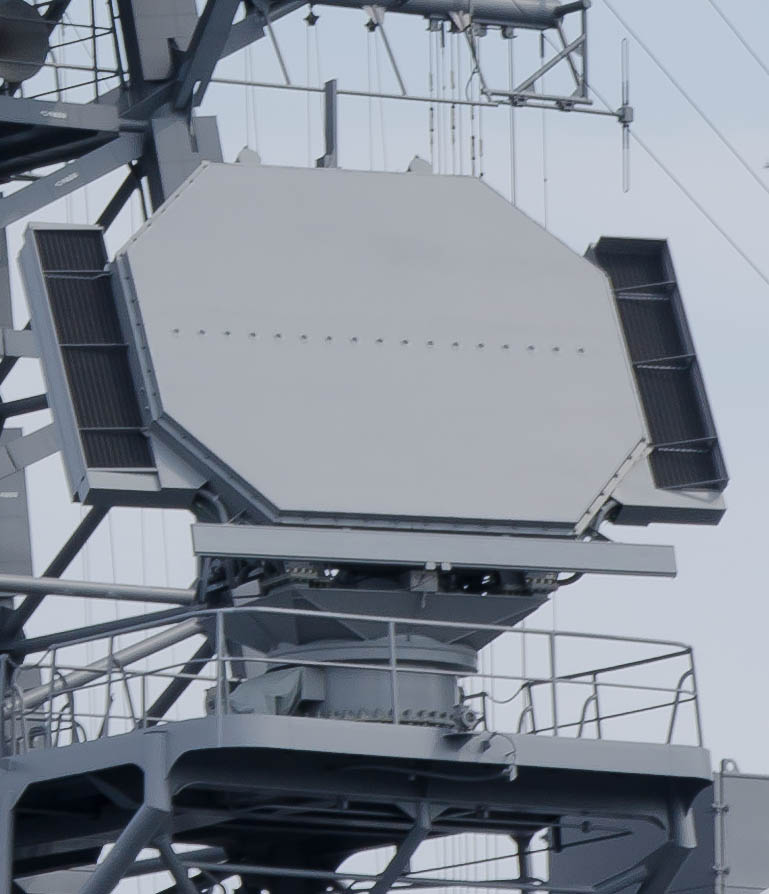 護衛艦「ありあけ」（JS Ariake, DD-109）搭載のOPS-24Bレーダー。